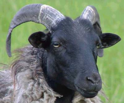 GNU Lizenz, Heidschnucke, Aufnahme 2002, Autor: Hokuzai, Heidschnucke: a north German moorland sheep.